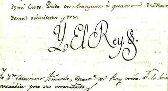 Firma del rey Carlos IV en el Libro de Independencia de Pradejón.